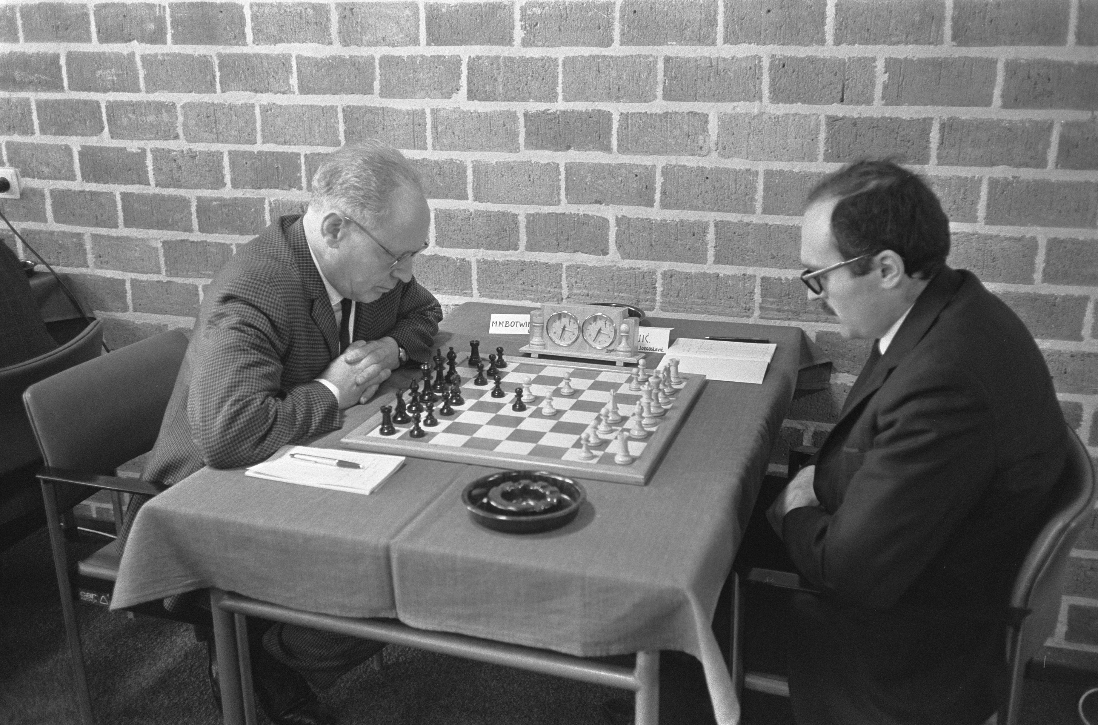 Collectie / Archief : Fotocollectie Anefo Reportage / Serie : [ onbekend ] Beschrijving : Hoogoven Schaaktoernooi Botwinnik (links) ( nr. 20 en 2 Datum : 14 januari 1969 Trefwoorden : schaken, toernooien Fotograaf : Koch, Eric / Anefo Auteursrechthebbende : Nationaal Archief Materiaalsoort : Negatief (zwart/wit) Nummer archiefinventaris : bekijk toegang 2.24.01.05 Bestanddeelnummer : 922-0146